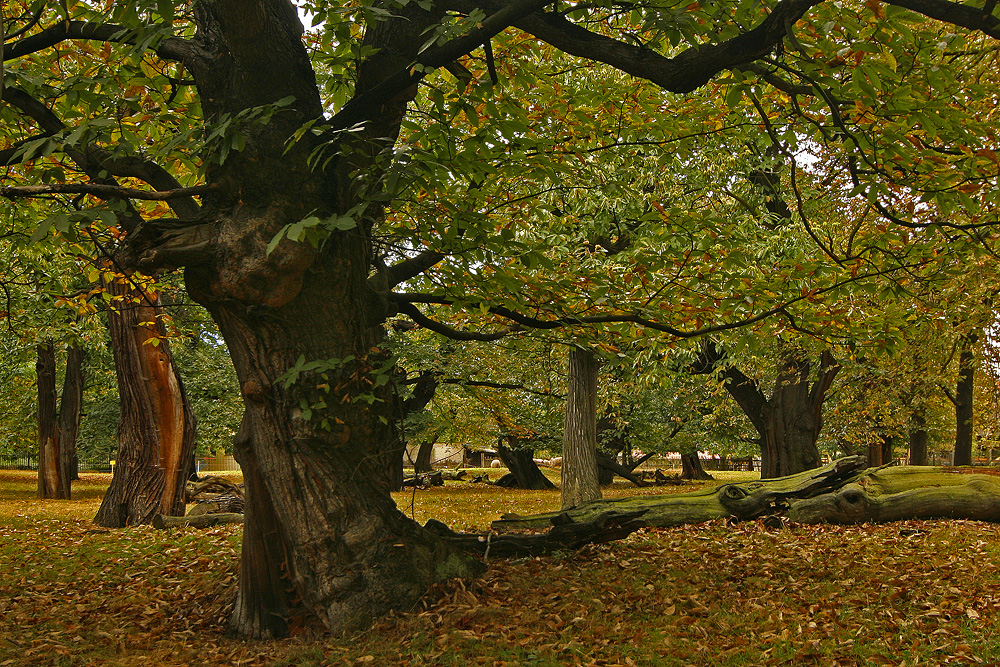 Kaštanový sad v Podkrušnohorském zooparku Chomutov